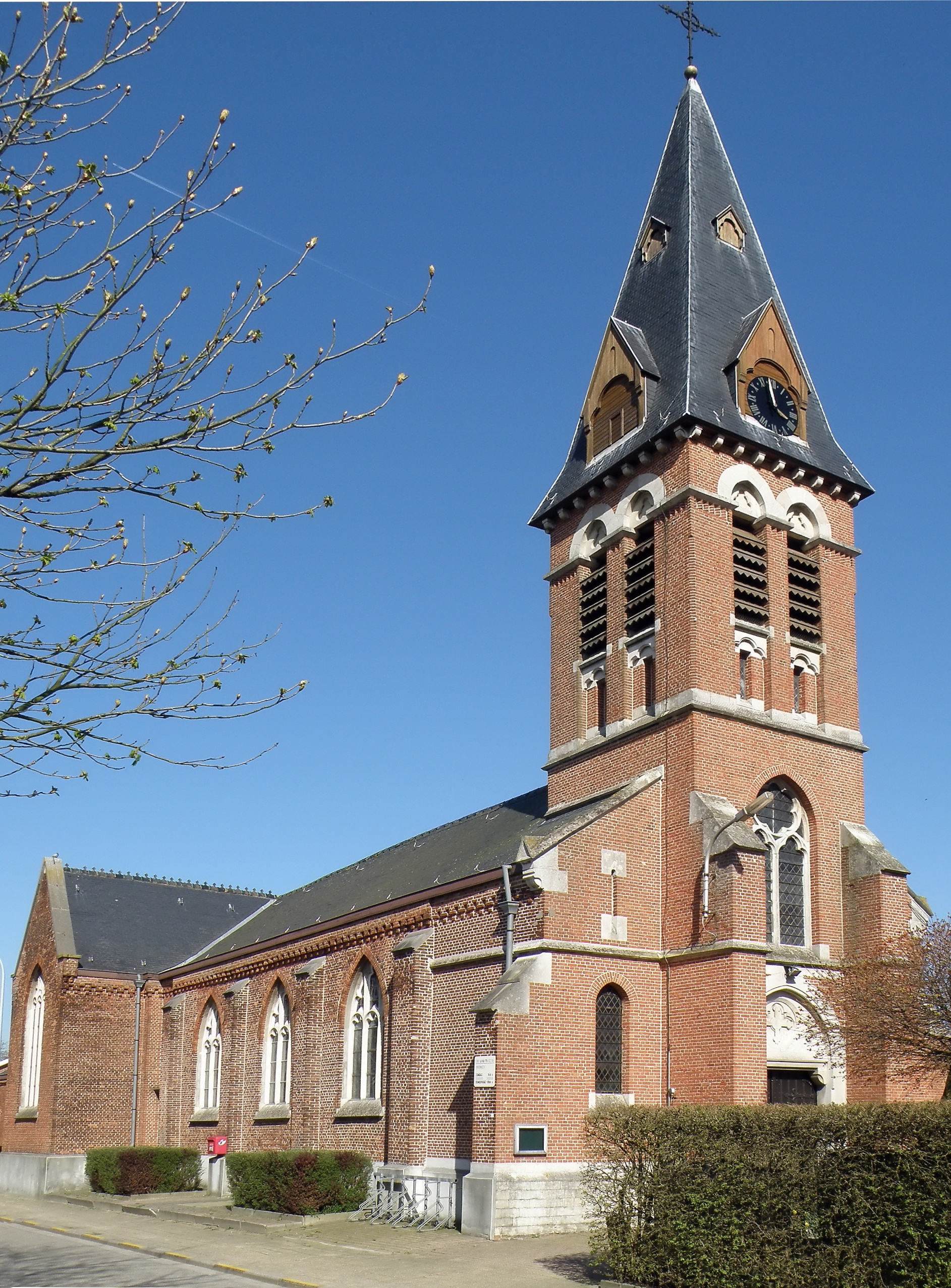 Weert, deelgemeente van Bornem, prov. Antwerpen (België). Sint-Annakerk, schip van 1787, neogotische dwarsbeuken en koor van 1859 (arch. J. Schadde), neogotische toren van 1875 (arch. L. Blomme). Vensters van schip in neogotische zin aangepast (spitsboog, maaswerk) door E. Careels in 1929.